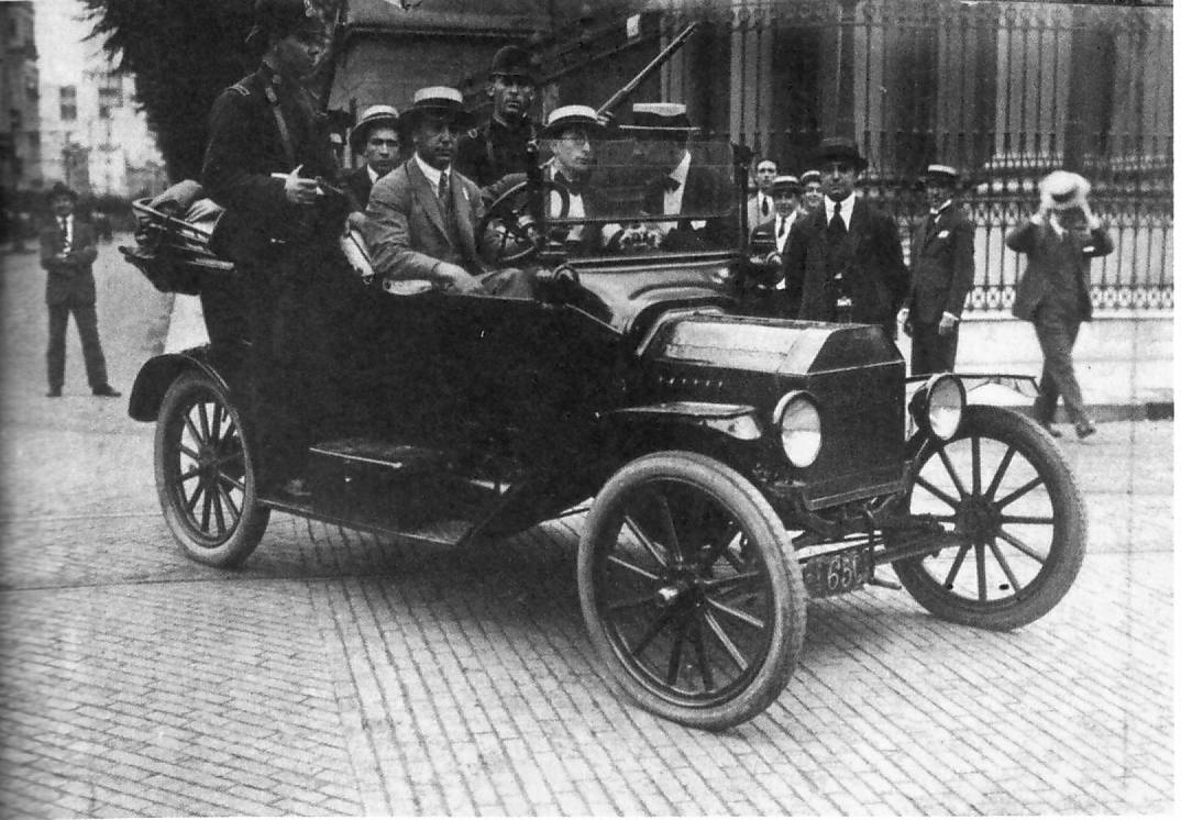 Miembros de la Liga Patriótica recorren las calles de Buenos Aires junto a la policía durante la Semana Trágica. Foto publicada en la revista Caras y Caretas Nº 1059, del 18 de enero de 1919